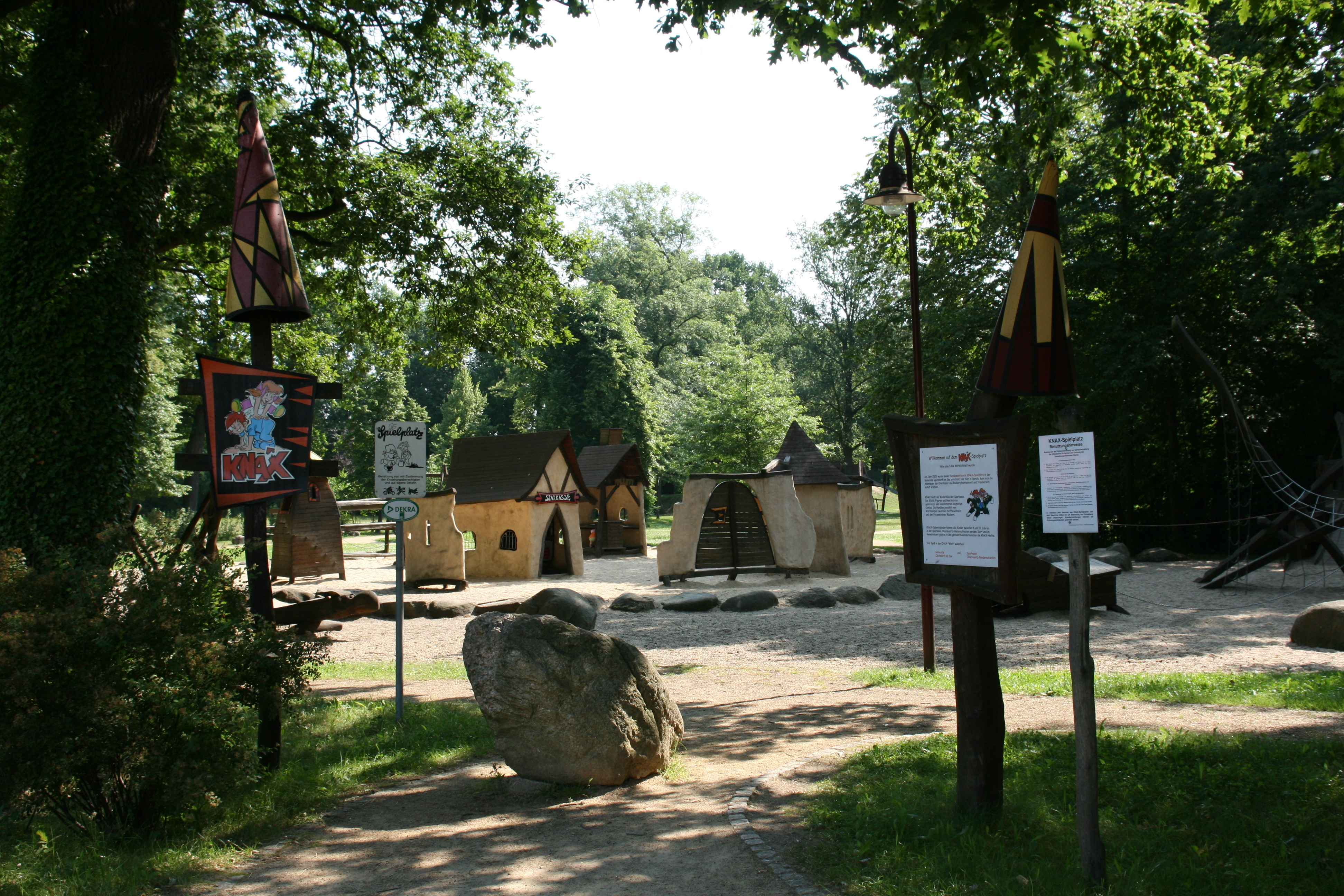 Knax-Spielplatz Sproitz. Jäcklein-Rohrbach-Straße in Sproitz, Quitzdorf am See